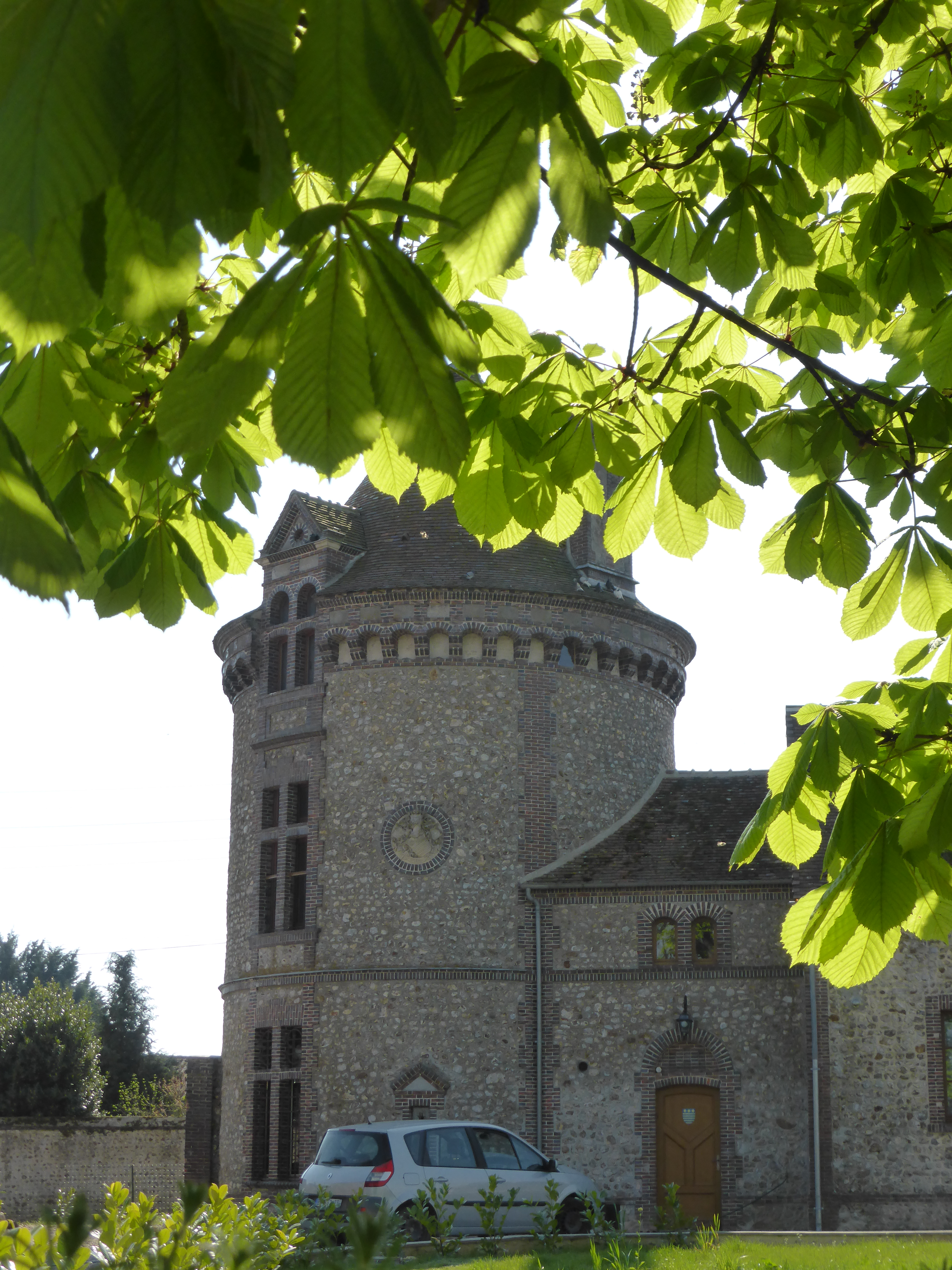 Tour d'Aligre à Champrond-en-Gâtine, en Eure-et-Loir.